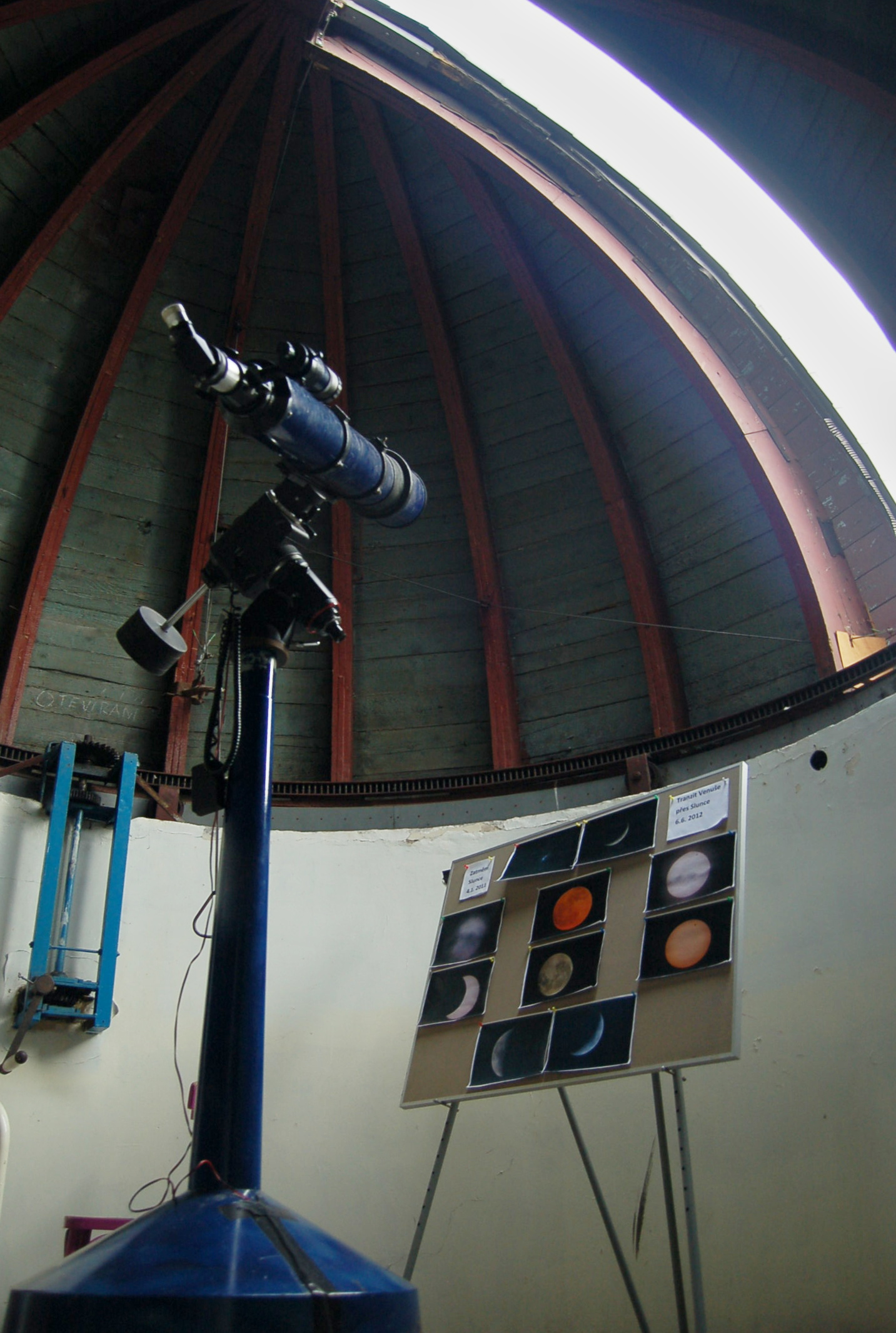 Dalekohled ve hvězdářské kopuli